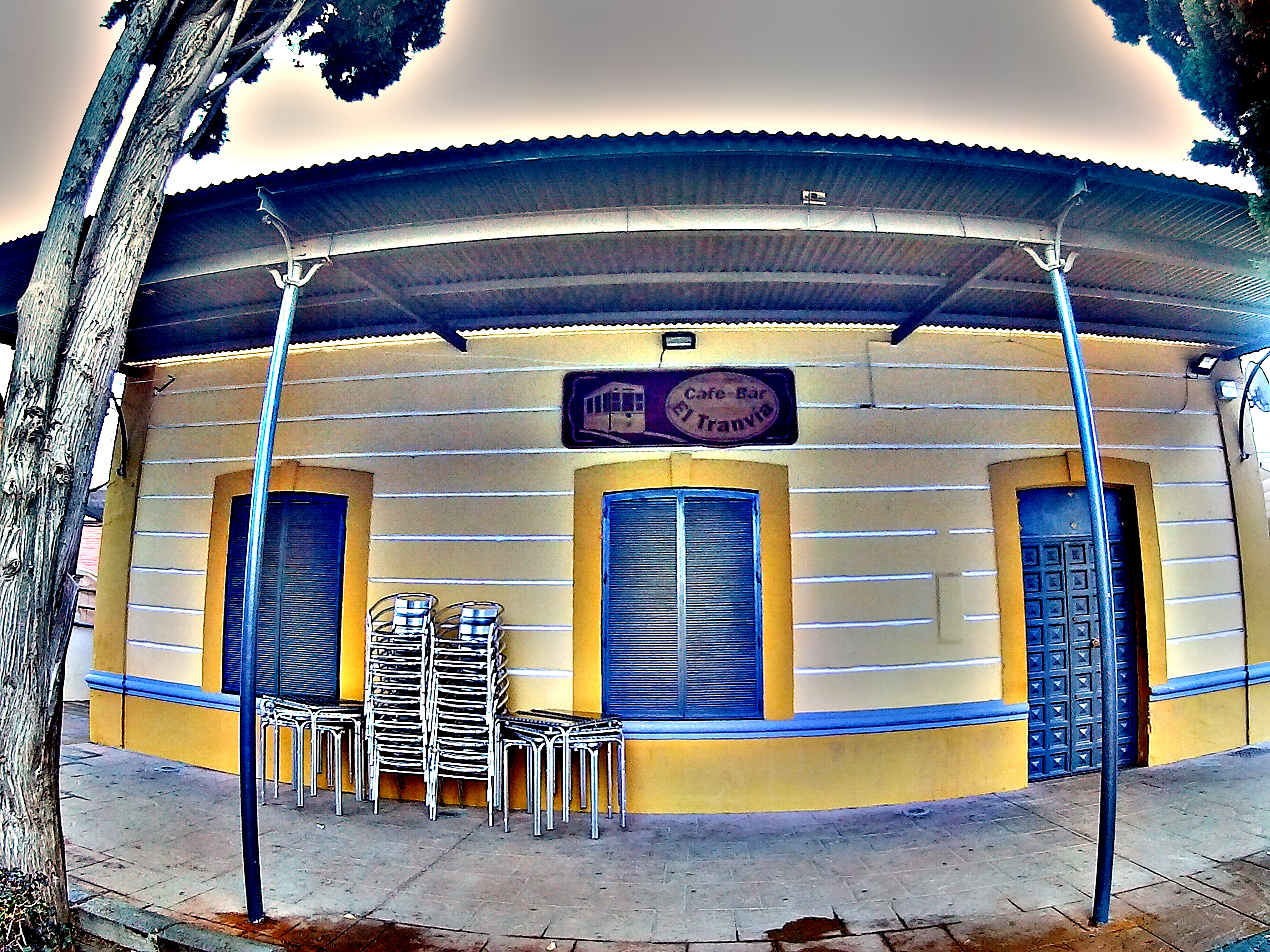 Antigua estación del tranvía, ahora convertida en bar.